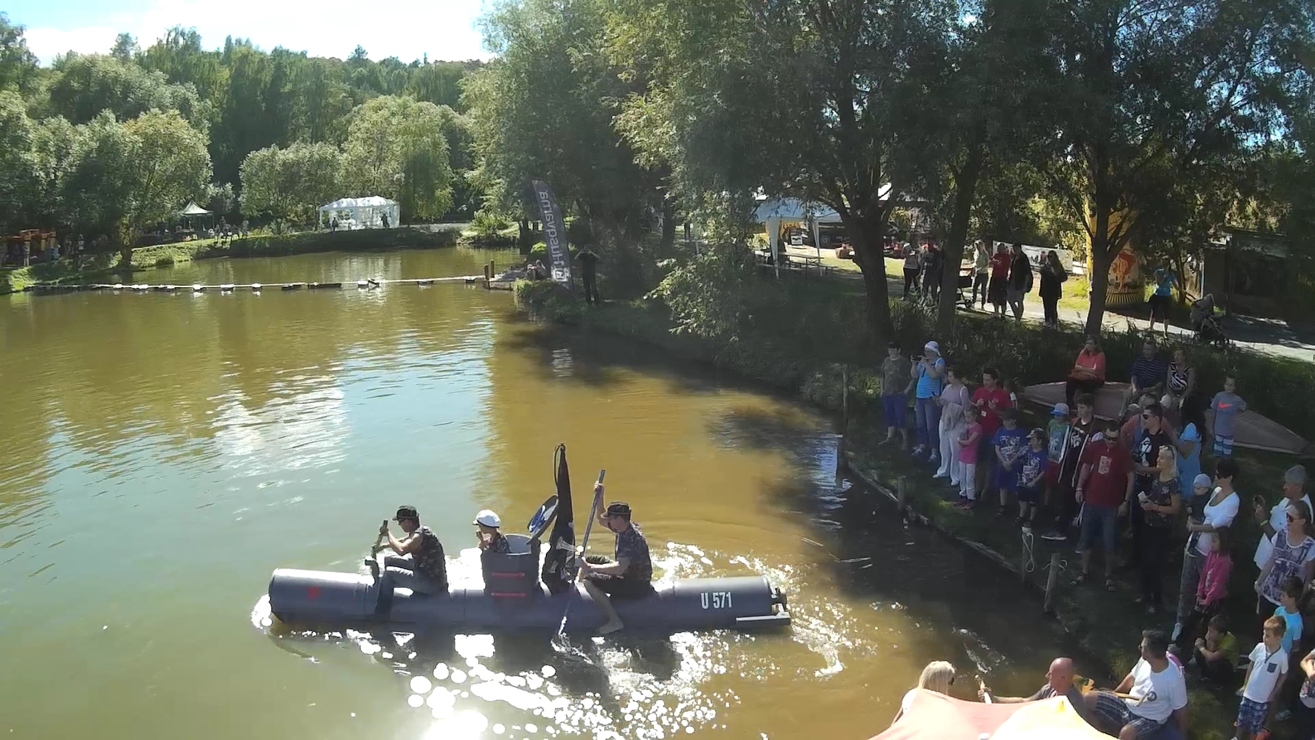 Neckyáda - kulturní akce na vodním parku